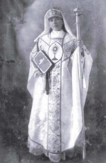 Arcykapłanka Izabela Wiłucka po konsekracji biskupiej w 1929 roku